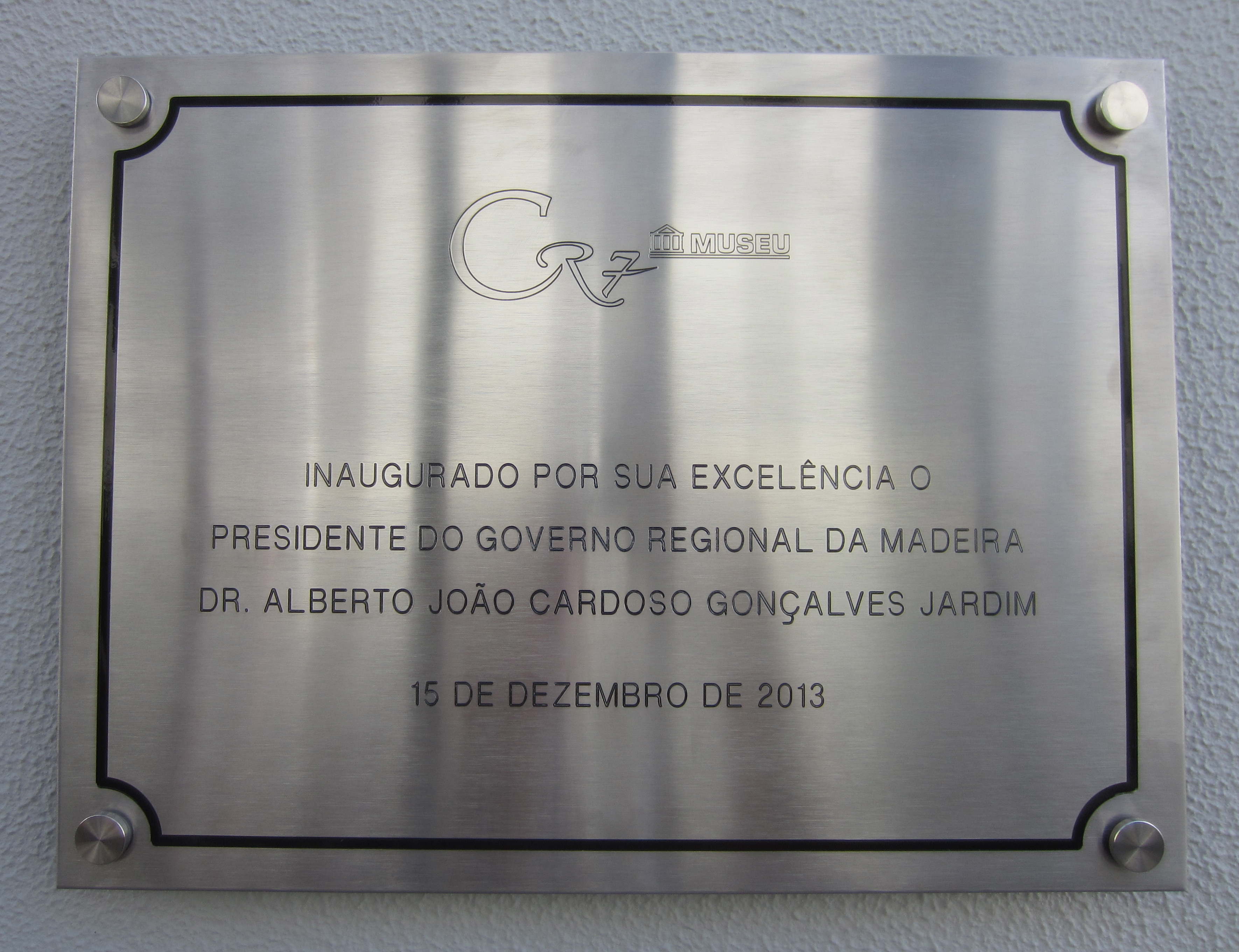 Plakett vid museet "CR7" - Christian Ronaldo med tröja nummer 7 - i Funchal, Madeira.